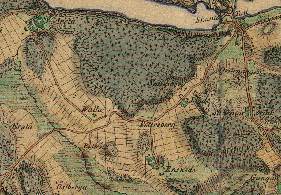 Karta över Årstafältet med Valla gårds ägor